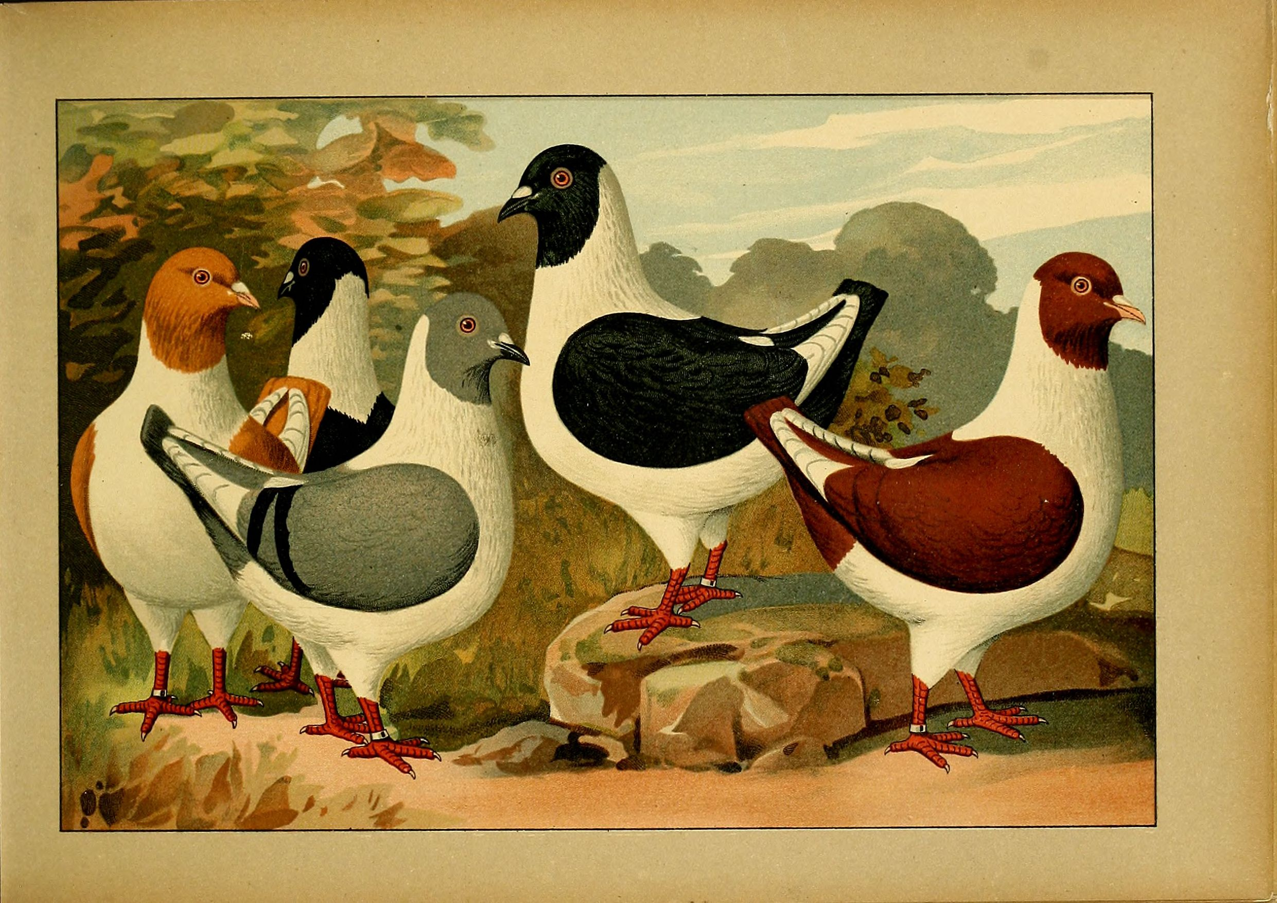 Deutsch